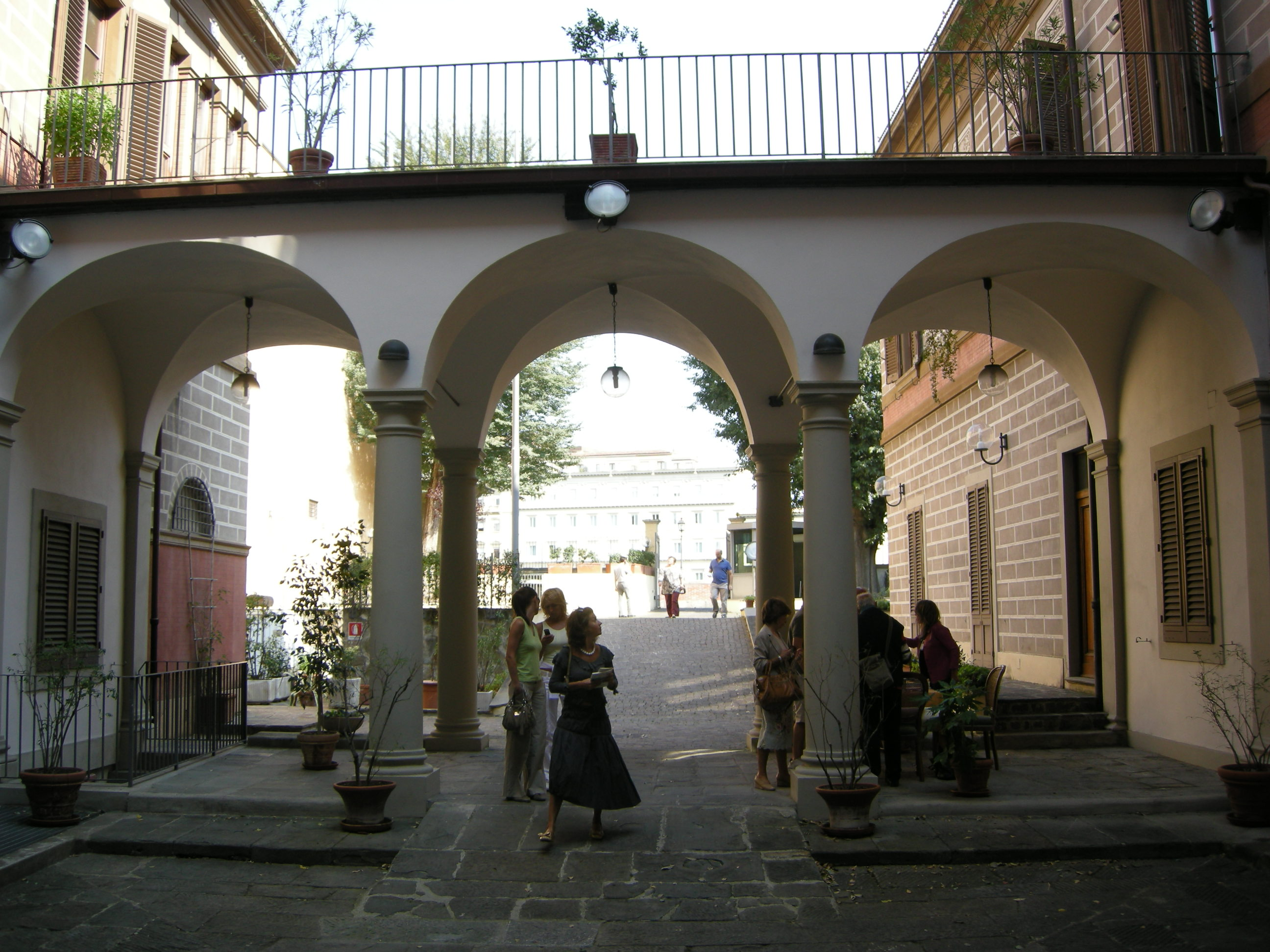 Casa capponi sul lungarno